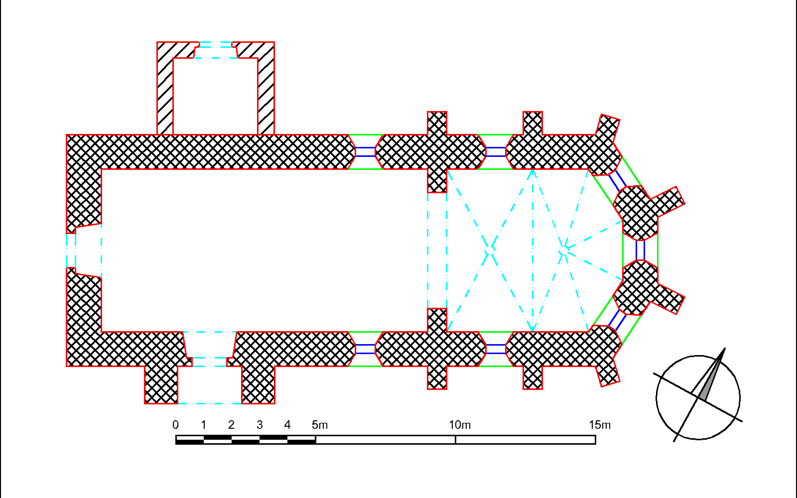 Kostel svatého Petra a Pavla v Přelíci. Půdorys kostela.